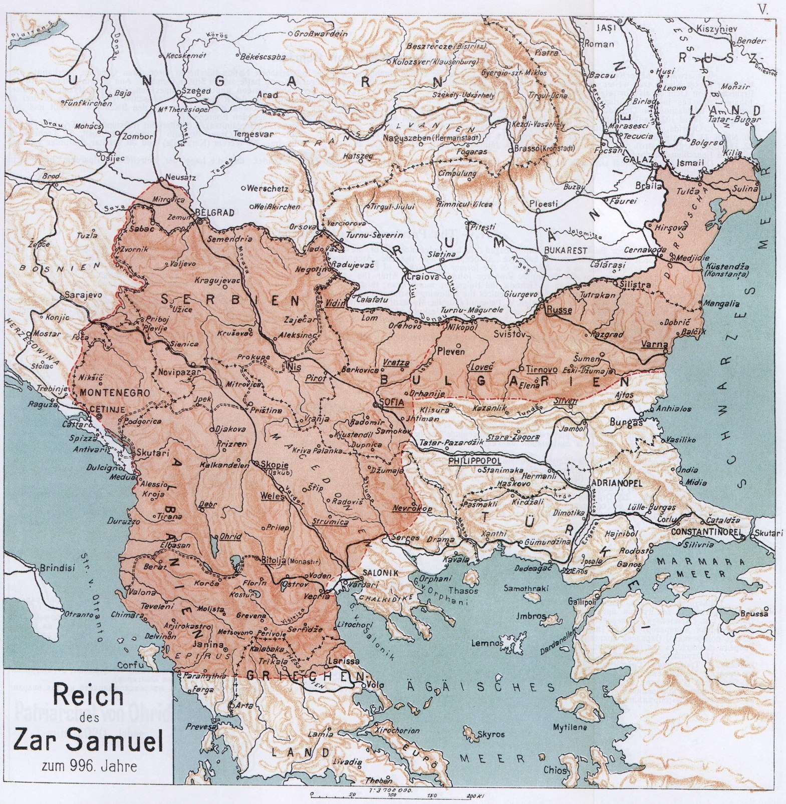 Bulgaria at the time of Samuil, 996